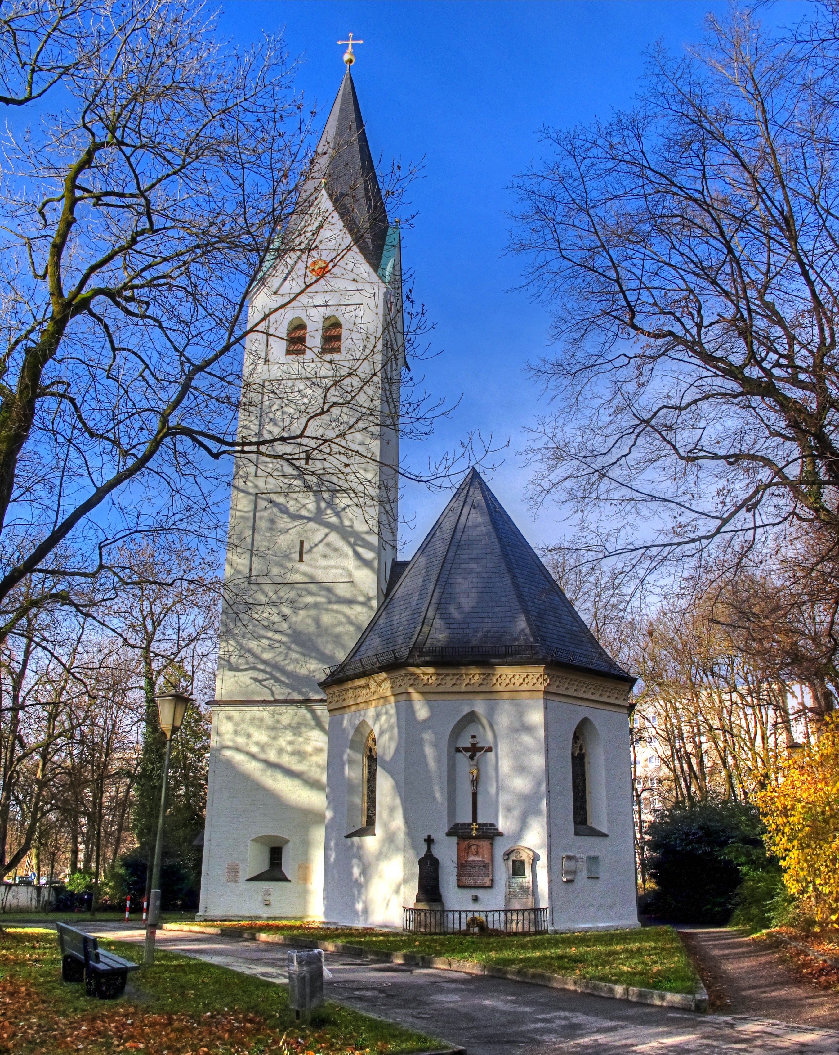 Deutschland, Bayern, München, Pasing, Pfarrkirche "Maria Geburt", HDR-Aufnahme